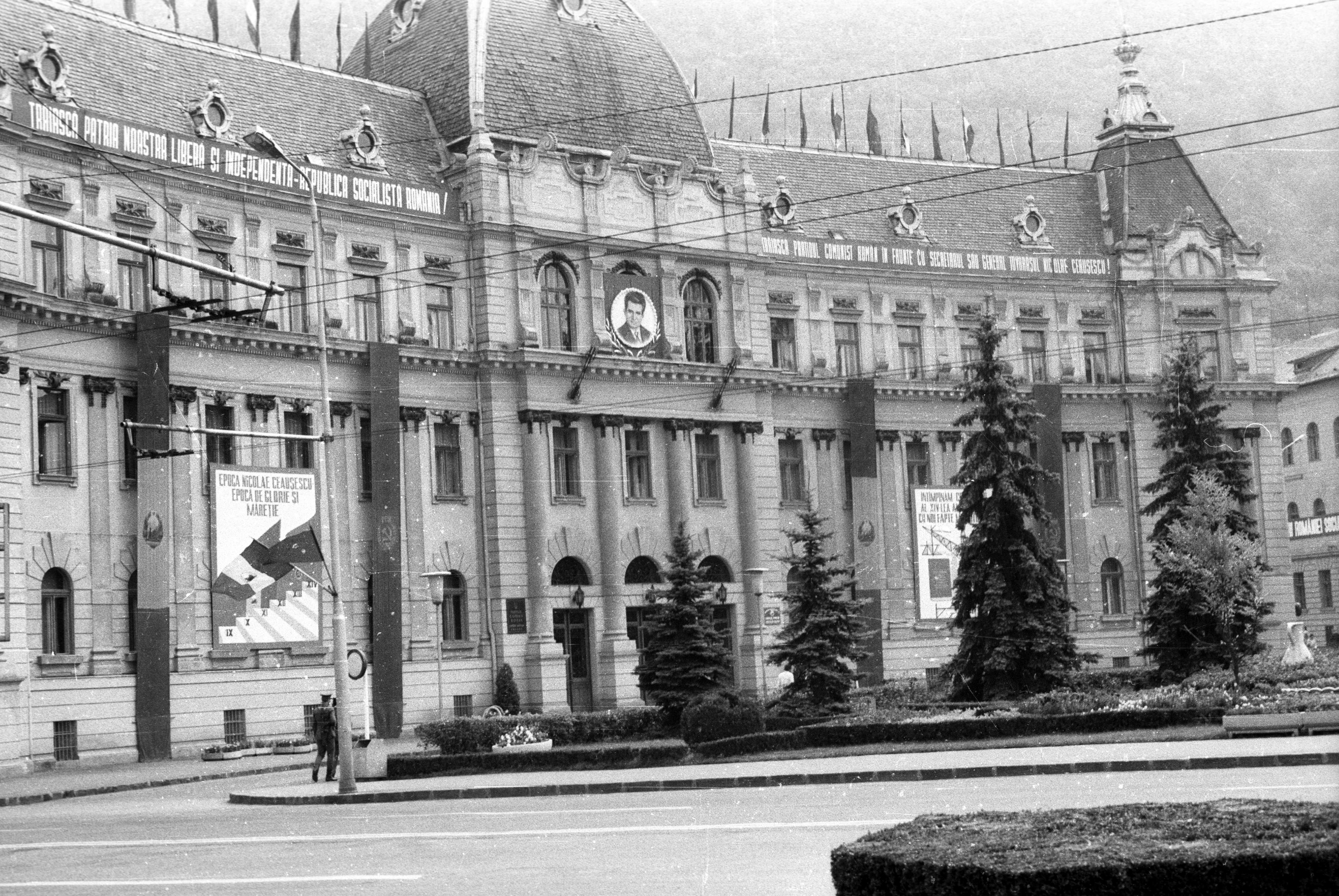 Bulevardul Eroilor, Igazságügyi palota (ma Palatul Prefecturii). Location: Romania, Transylvania, Brasov Tags: Nicolae Ceaușescu-portrayal Title: Bulevardul Eroilor, Igazságügyi palota (ma Palatul Prefecturii).